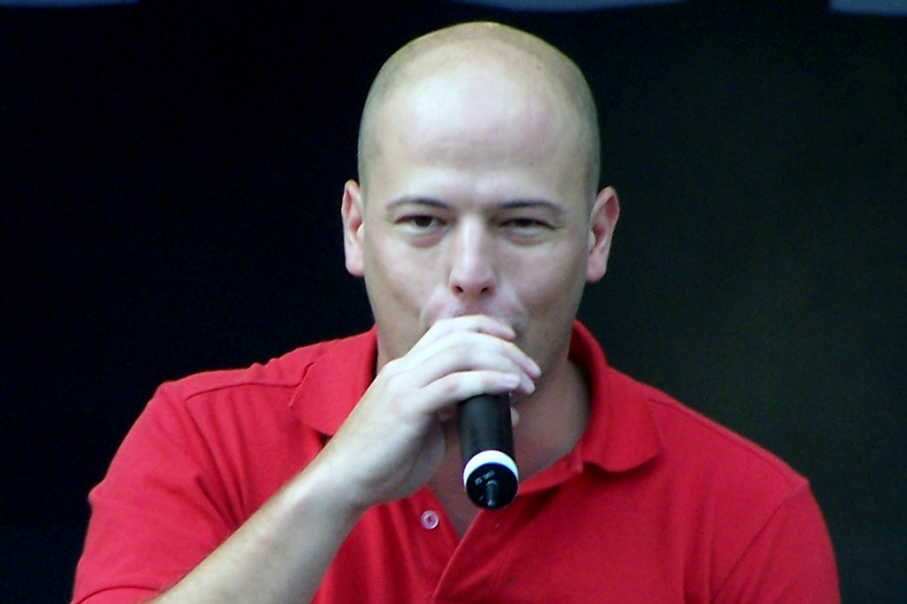 Belgian singer Flip Kowlier